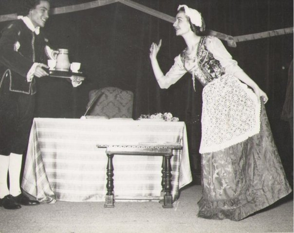 1957 (aprile) a Bologna, attore sul palcoscenico della Campagnia Teatrale del Teatro Minimo diretto da Renato Lelli.